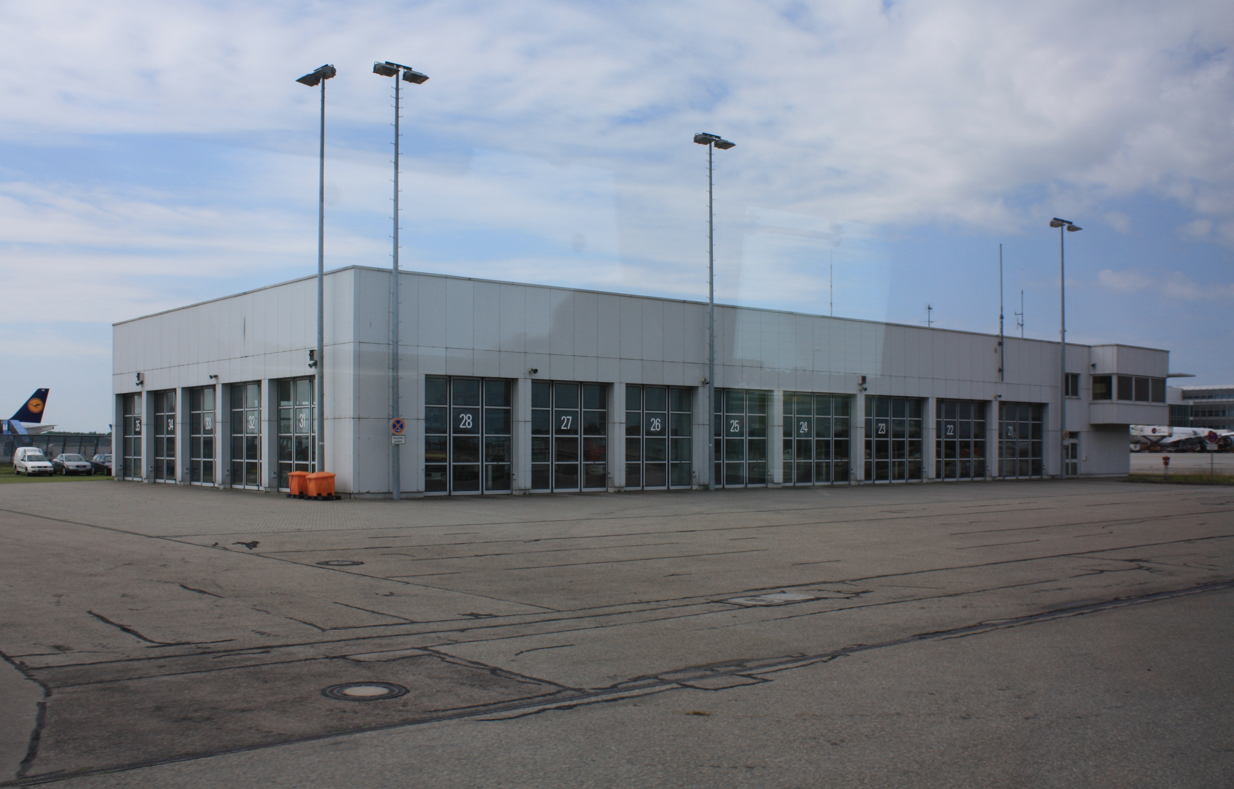 Flughafenwache Nord am Flughafen München